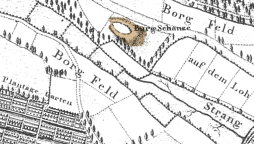 Gernandesburg, Wall nachträglich braun eingefärbt